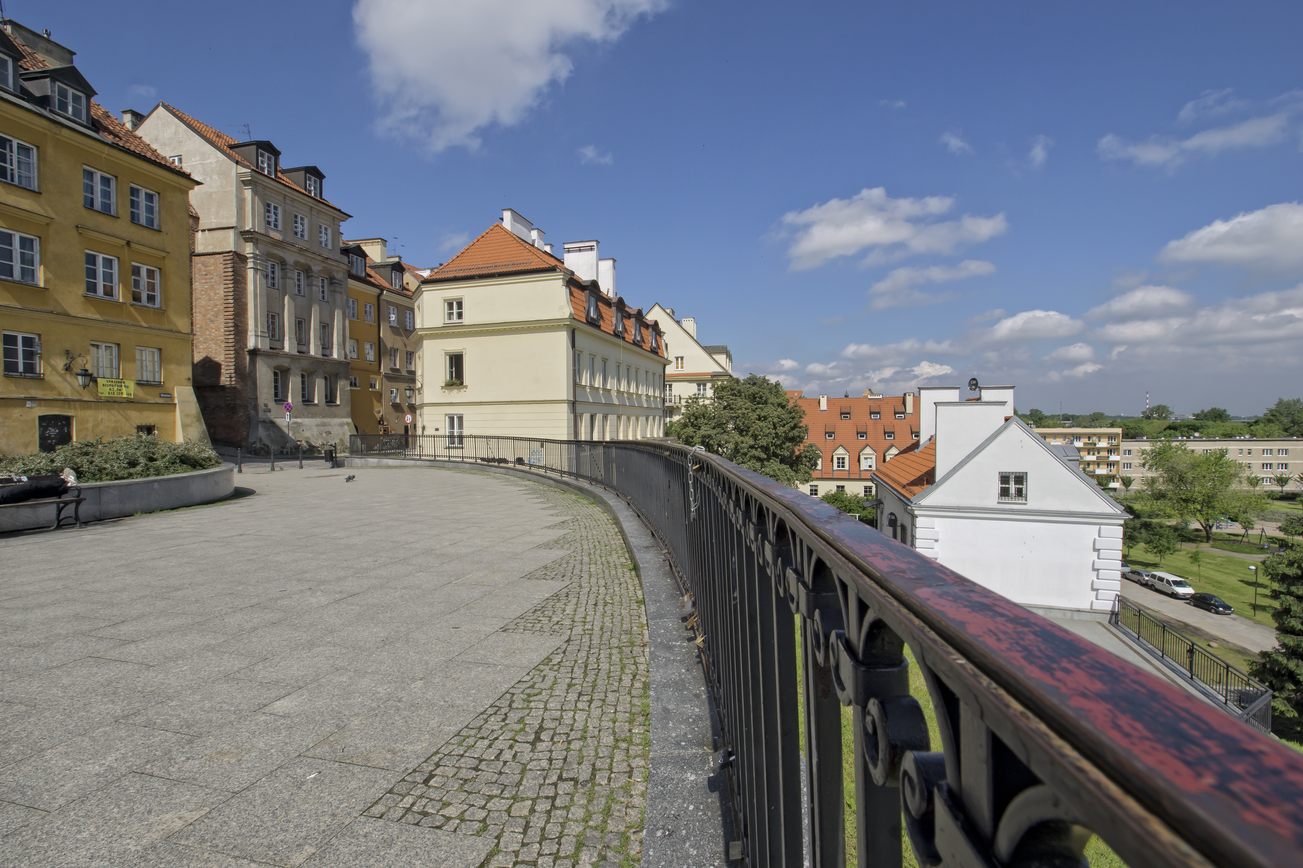 Góra Gnojna w Warszawie. Widok w stronę skrzyżowania ulicy Brzozowej i Celnej